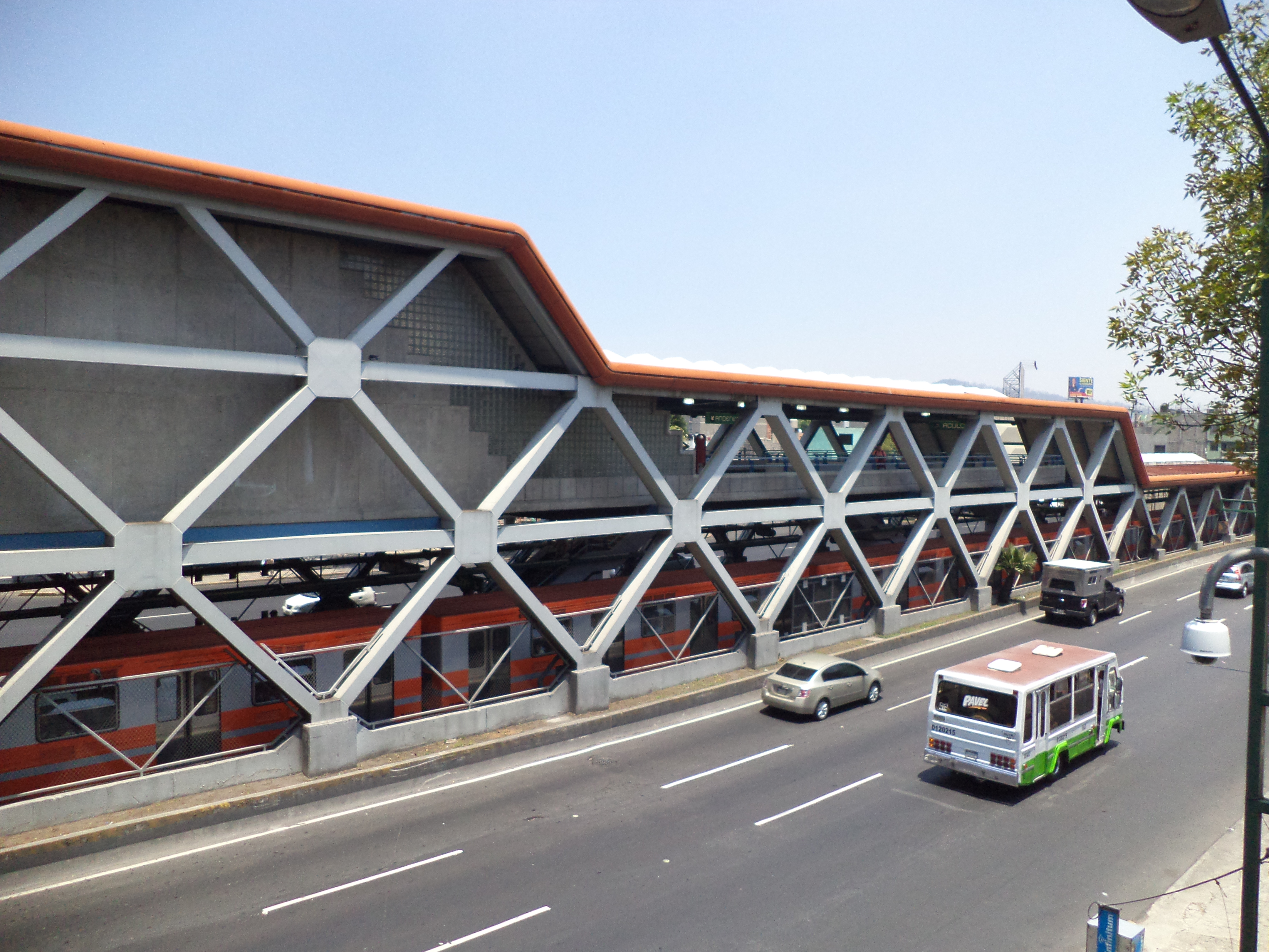 estacion aculco